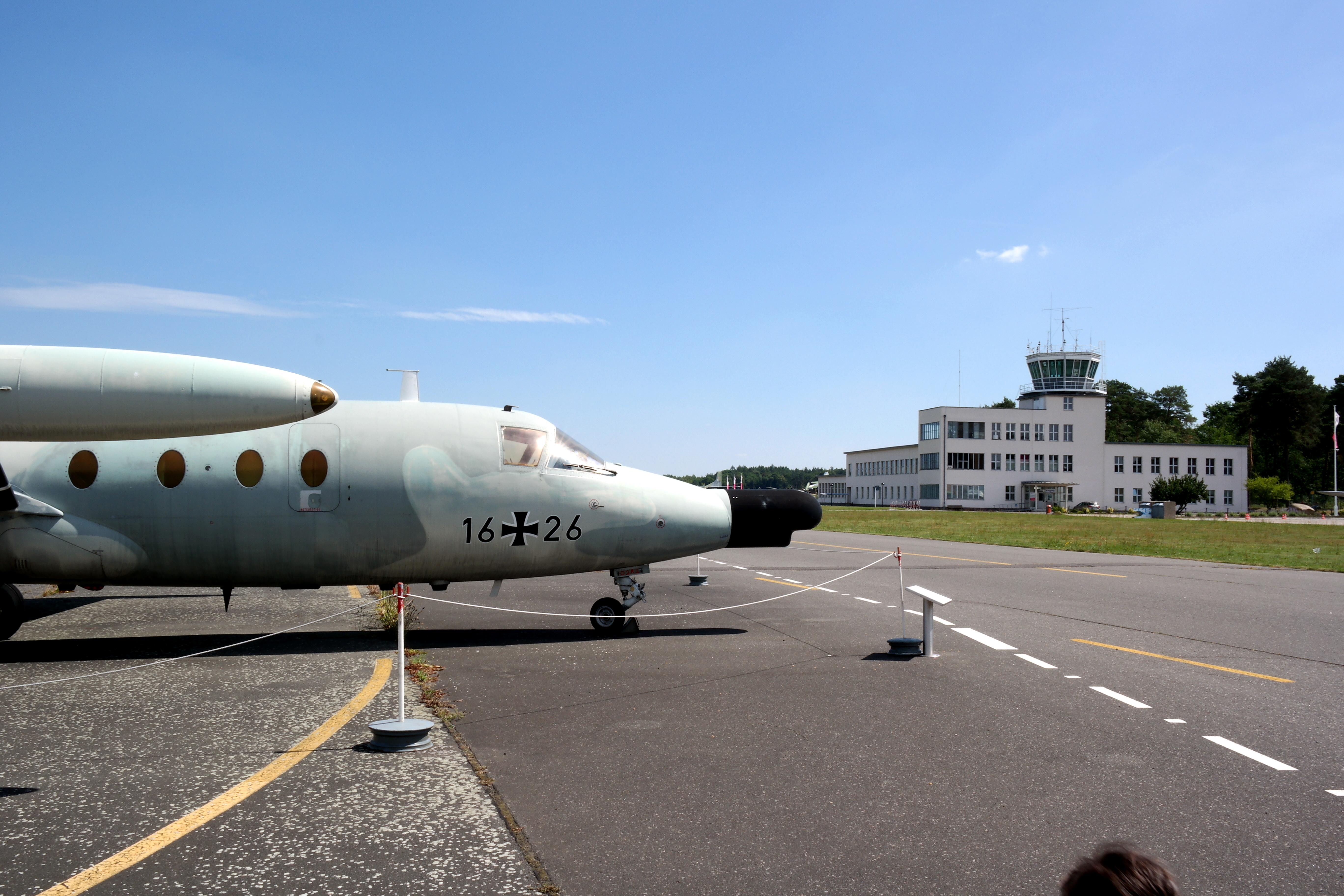 MBB HFB 320M Hansajet ECM - Militaerhistorisches Museum der Bundeswehr Flugplatz Berlin-Gatow